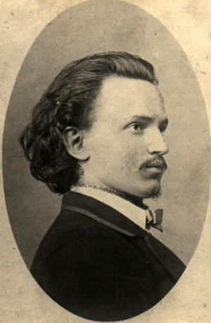 Josef Tulka (1846 - †?), Český malíř.